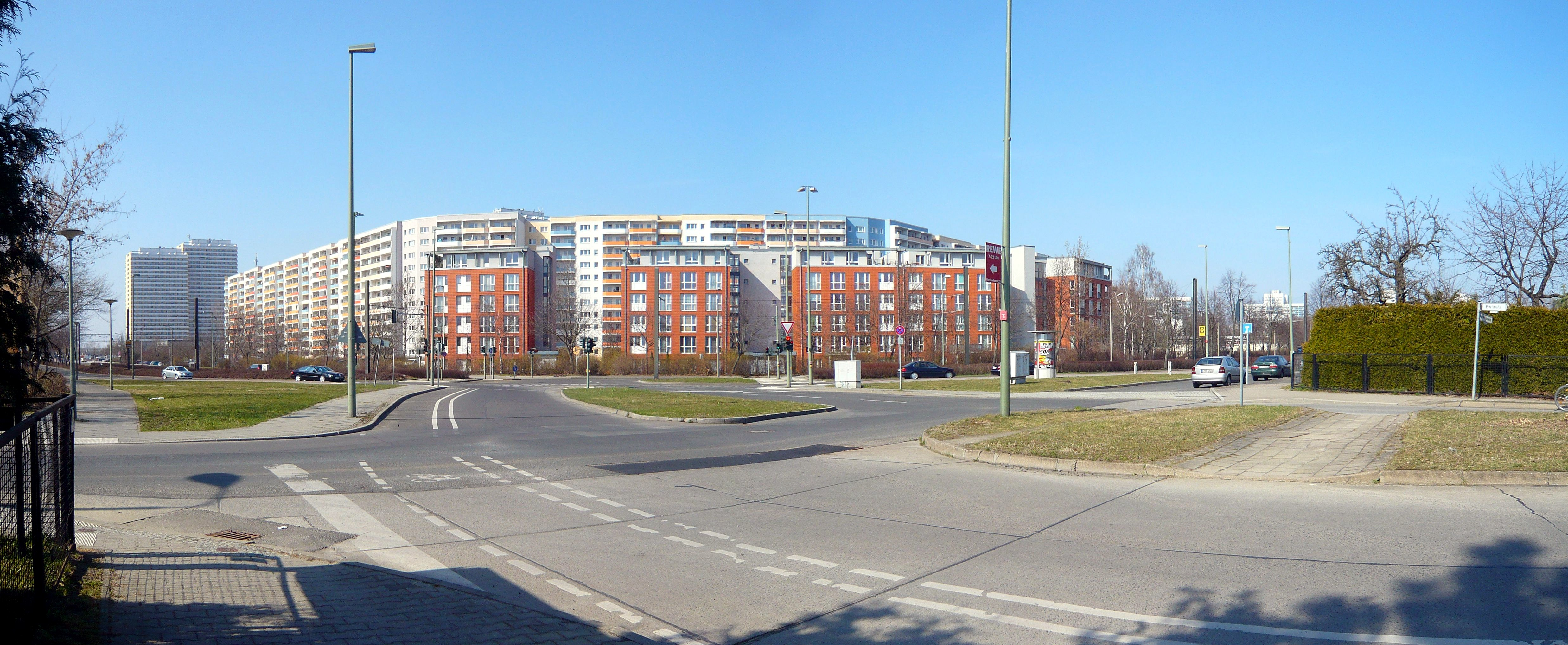 Ortsteil Marzahn: Allee der Kosmonauten